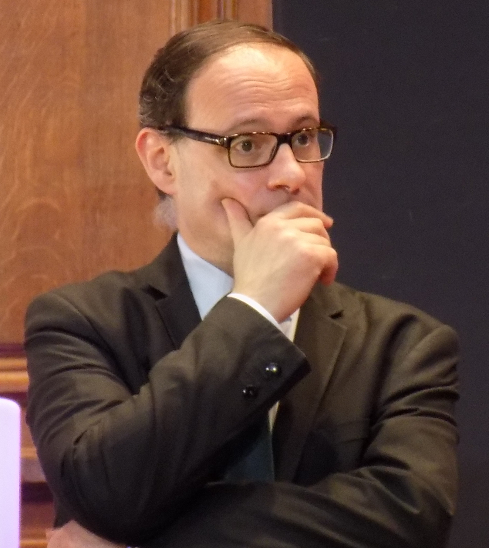 Alain Tallon lors du forum « L’année vue par l’histoire » organisé par France Culture le 25 avril 2015